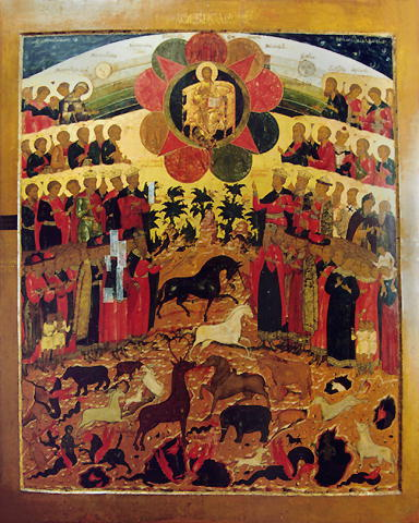 "Хвалите Господа с небес". XVI в. Ярославль